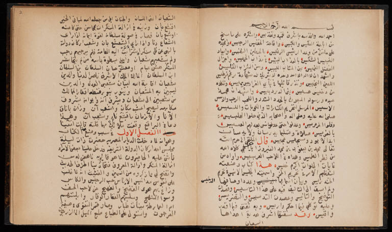 فيروزآبادي أبو طاهر مجد الدين محمد بن يعقوب بن محمد بن إبراهيم بن عمر الشيرازي الإمام اللغوي الشهير ولد بكارَِزين وهي بلدة بفارس ـ وقد صرح هو بذلك في مادة ك ر ز ـ سنة تسع وعشرين وسبعمائة هجرية ، أي في فترة العصر المغولي الذي بدأ بسقوط بغداد في قبضة التتار على يد هولاكو سنة 656 هـ ، وانتهى بدخول العثمانيين مصر سنة 923هـ ، وجاءت ولادته بعد وفاة "ابن منظور" صاحب "لسان العرب" بثماني عشرة سنة. كتابه هذا إسمه الجليس الأنيس في أسماء الخندري من كتبه الإخرى . القاموس المحيط. . تحبير المُوشِّين في التعبير بالسين والشين . وهو مطبوع. . شرح قصيدة بانت سعاد في مجلدين. . الروض المسلوف فيما له اسمان إلى ألوف. .الدرر المبثَّثة في الغرر المثلثة . وهو مطبوع . المثلث الكبير في خمسة مجلدات. . أنواء الغيث في أسماء الليث. . مقصود ذوي الألباب في علم الإعراب. . أسماء السراح في أسماء النكاح. . بصائر ذوي التمييز في لطائف الكتاب العزيز . وهو مطبوع. . تفسير فاتحة الكتاب. . حاصل كورة الخلاص في فضائل سورة الإخلاص. . تنوير المقباس في تفسير ابن عباس . وهو مطبوع. . روضة الناظر في ترجمة الشيخ عبد القادر. . المرقاة الوفية في طبقات الحنفية. . المرقاة الأرفعية في طبقات الشافعية. . البلغة في تراجم أئمة النحاة واللغة . وهو مطبوع. . نزهة الأذهان في تاريخ أصبهان. . شوارق الأسرار العلية في شرح مشارق الأنوار النبوية. . منح الباري بالسيل الفسيح الجاري في شرح صحيح البخاري. . تسهيل طريق الوصول إلى الأحاديث الزائدة على جامع الأصول . . الأحاديث الضعيفة. . الدر الغالي في الأحاديث العوالي. . الصلات والبشر في الصلاة على خير البشر . وهو مطبوع. . سفر السعادة ، وهو مطبوع. . عدة الحكام في شرح عمدة الأحكام. . الإسعاد بالإصعاد إلى درجة الاجته مات رحمه الله في زَبيد ليلة الثلاثاء من شوال سنة 817 هـ ، وقد ناهز التسعين ، ولم يزل إلى حين موته متمتعًا بسمعه وبصره ، متوقِّد الذهن ، حاضر العقل . قال السخاوي : وكان يرجو وفاته بمكة فما قُدِّرَ له ذلك . ودُفِنَ بتربة الشيخ إسماعيل الجبرتي. User:Tarawneh/rami